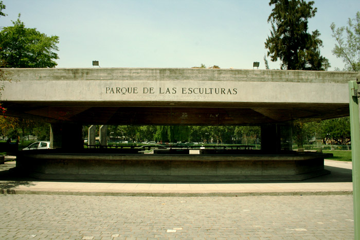 Frontis de la sala de exposiciones del Parque de las Esculturas.